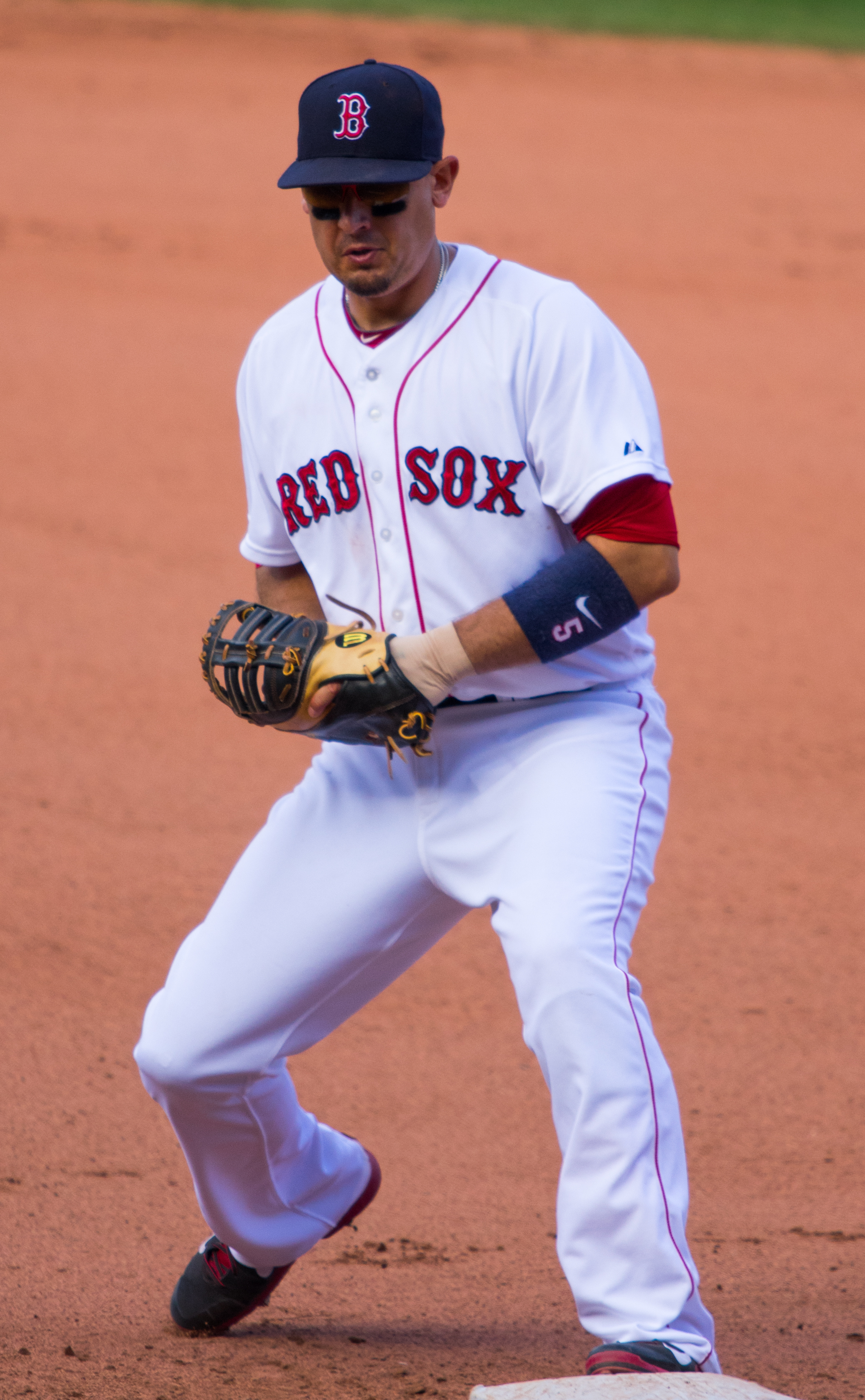 Allen Craig